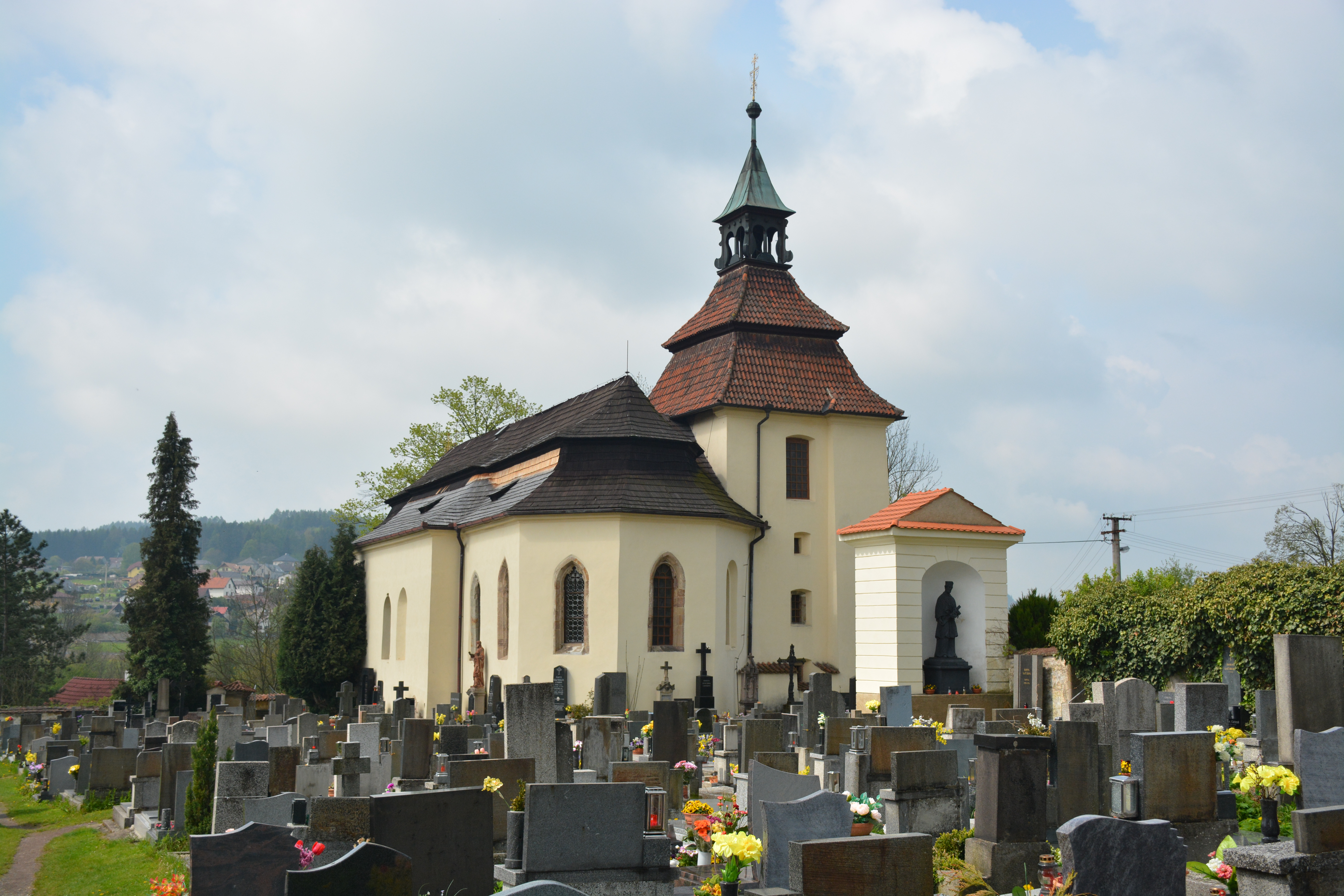 Pohled z Východu